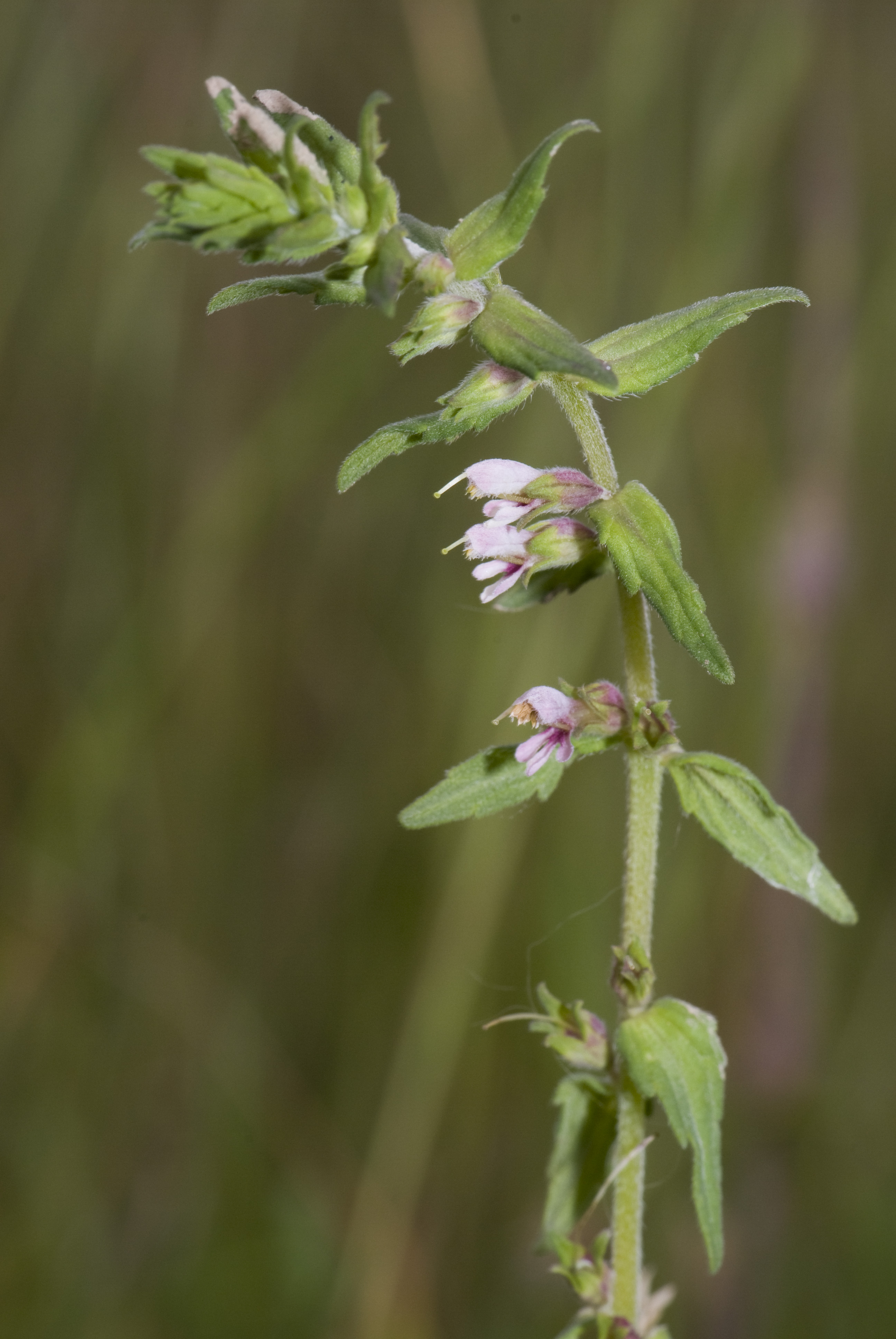 Odontites vernus Vallée de Grâce à Amiens (Somme), France